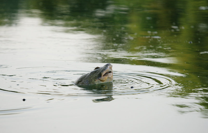 Rùa Hoàn Kiếm.